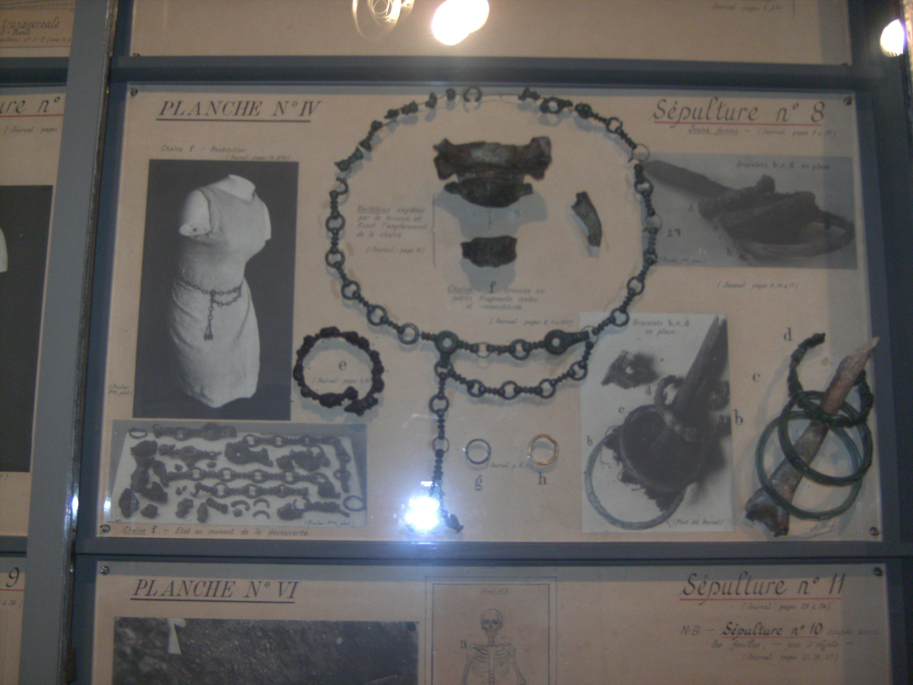 Vevey (Suisse - Musée historique - panneaux d'exposition, œuvre d'Albert Naef présentant les objets trouvés dans les tombes de l'âge de la Tène mises à jour au lieu-dit « En Crédeyles ». Début XXe siècle. Restauration 2005-2006.